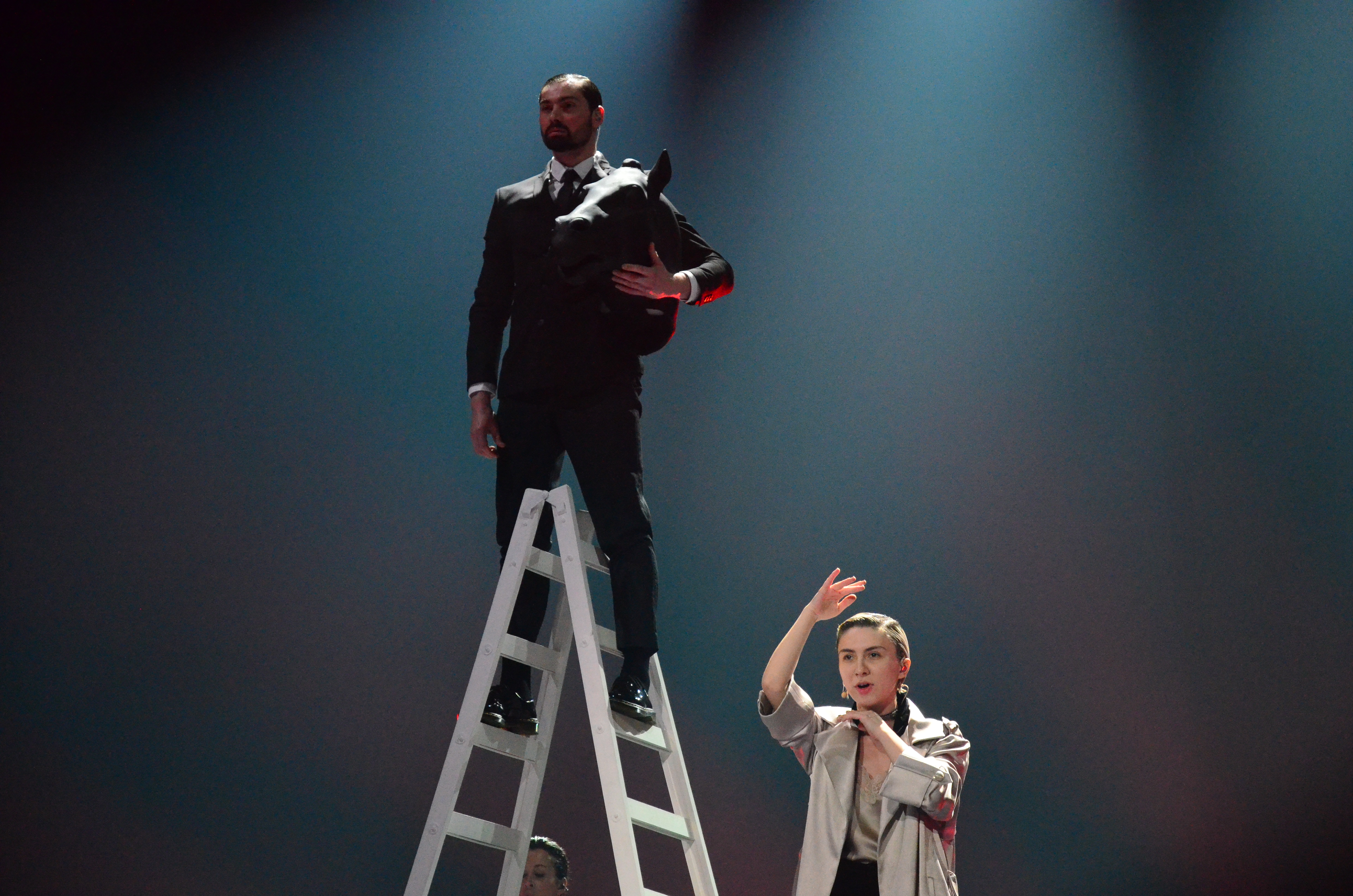 12 травня. Генеральна репетиція фіналу Євробачення 2017. Dihaj (Azerbaijan).